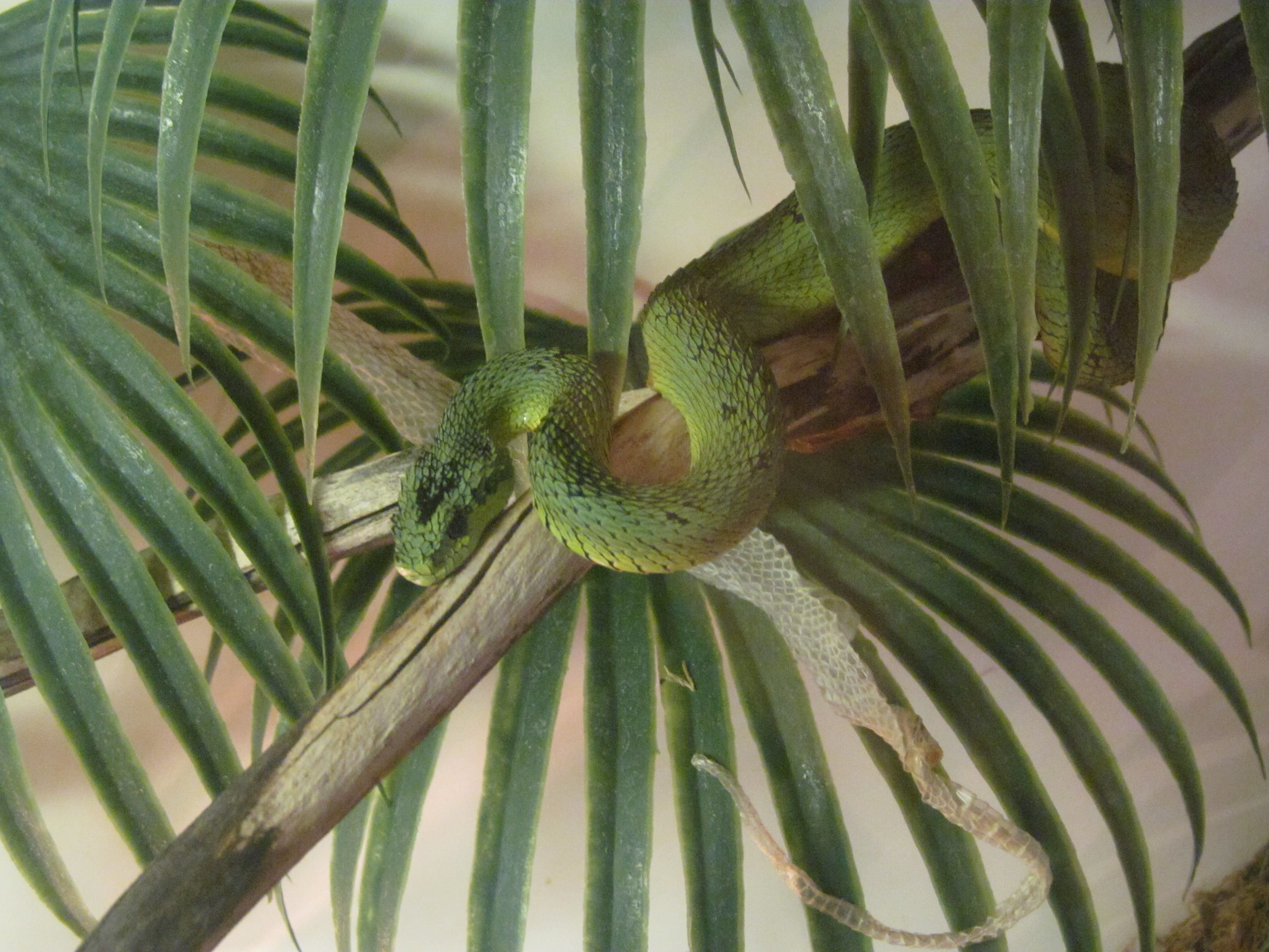 Чёрно-зелёная лесная гадюкаLatina: Atheris nitschei